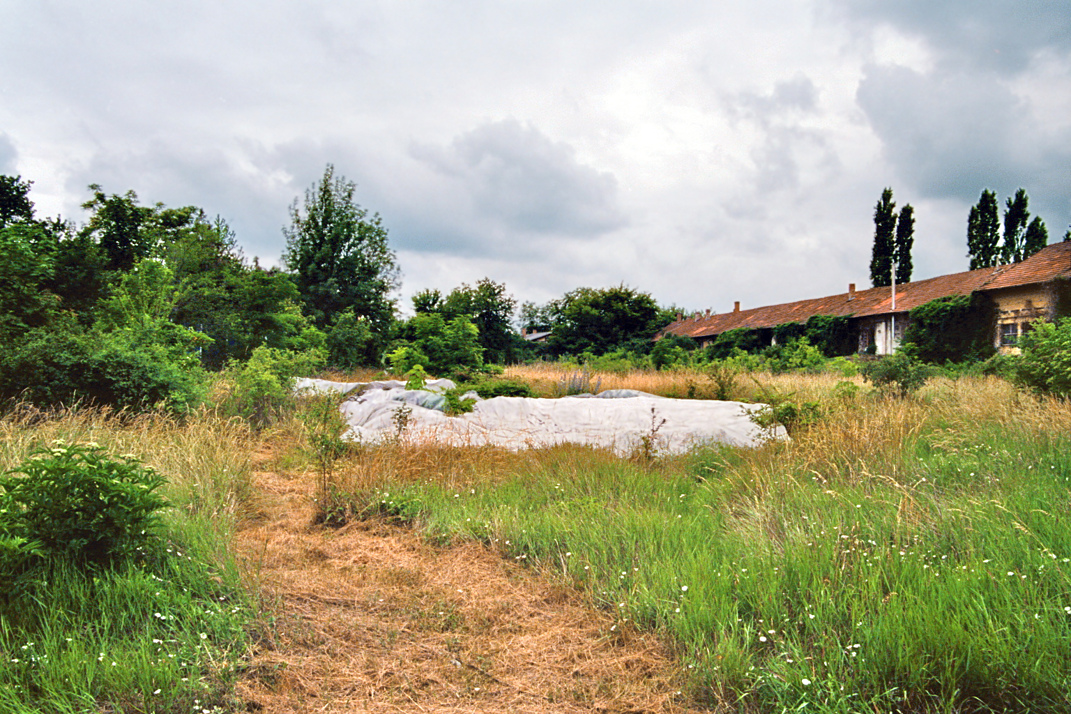 Szentendre (Ungarn): Nördliches Gelände des römischen Kastells. Ergrabene Mauerstümpfe sind mit Plastikplanen provisorisch abgedeckt. This is a photo of a monument in Hungary, Identifier: 7397